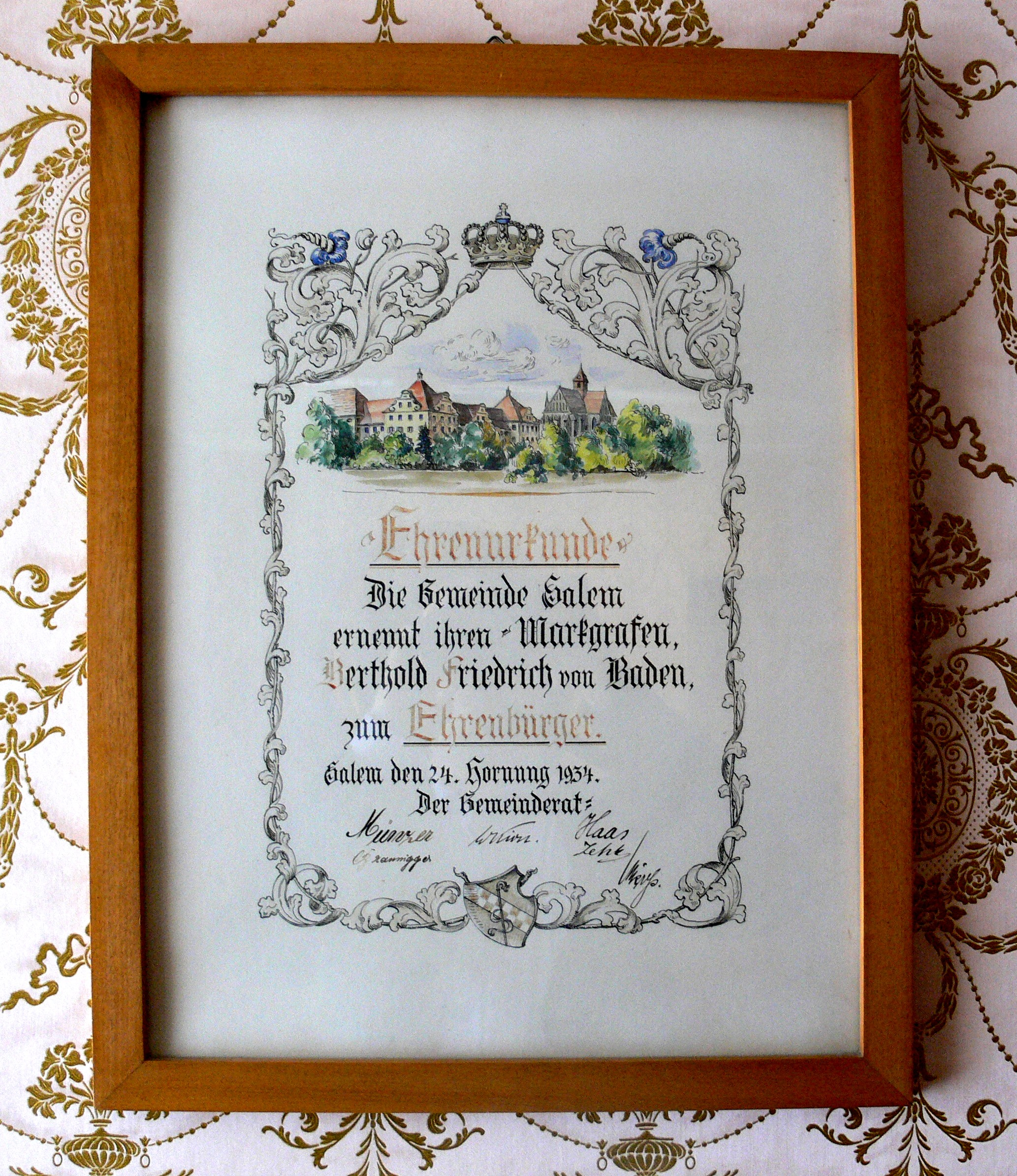 Ehrenbürgerurkunde der Gemeinde Salem für „ihren Markgrafen“ Berthold Friedrich von Baden, „24. Hornung 1934“